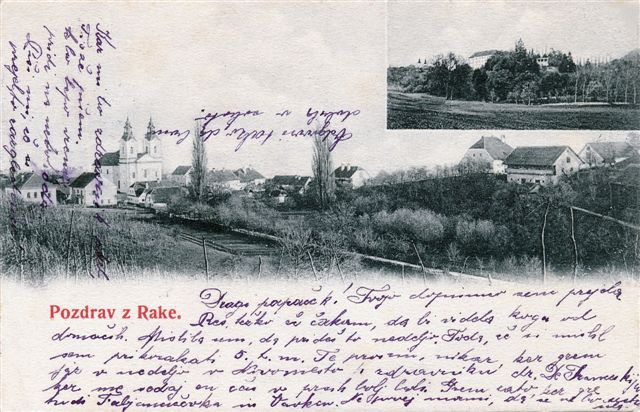 Grad Raka